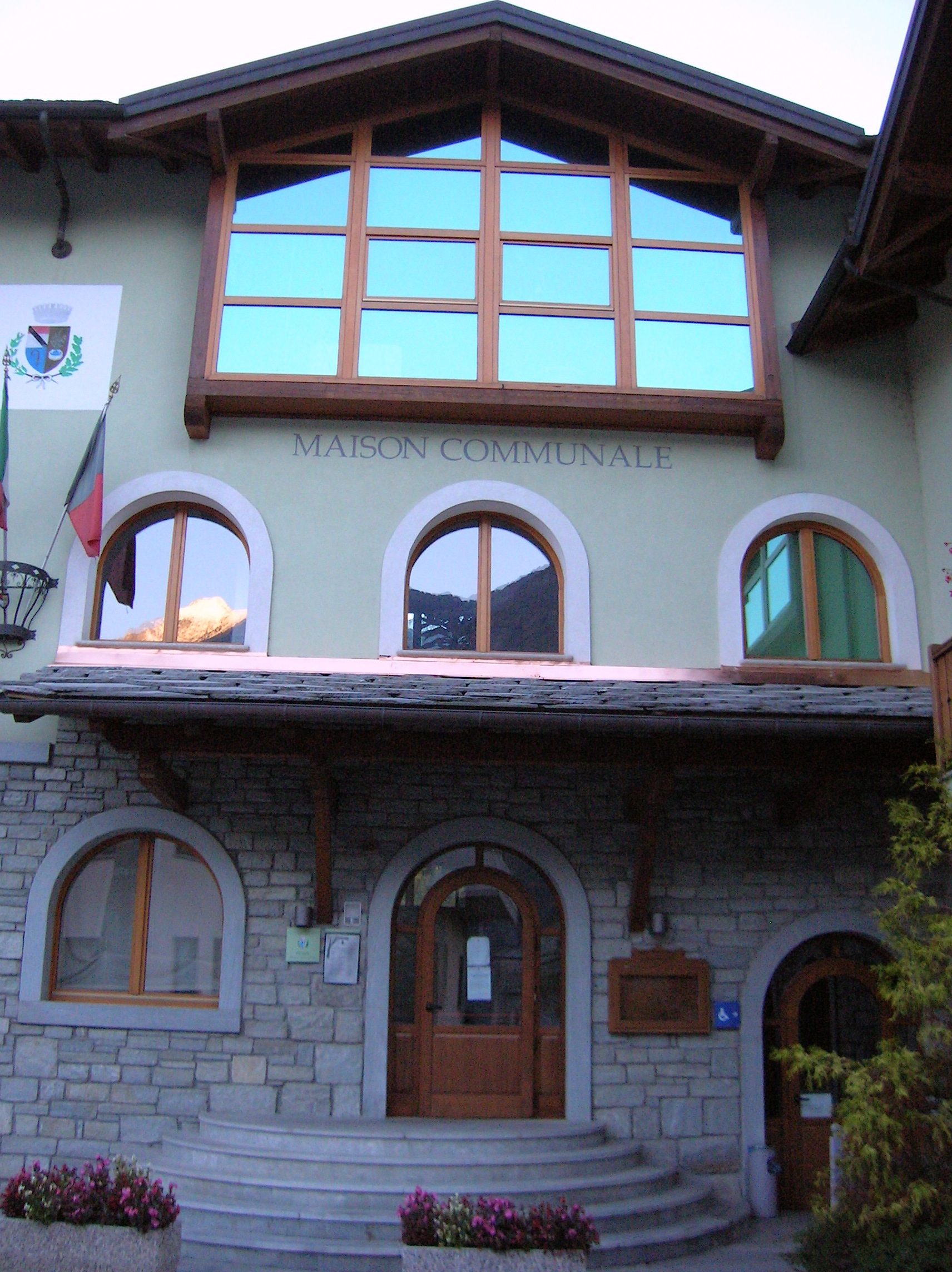 Municipio di Issogne